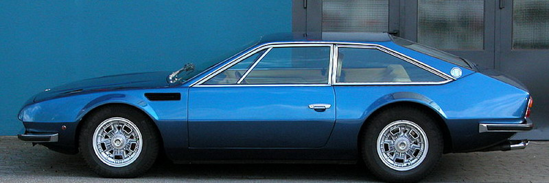 1972 Lamborghini Jarama